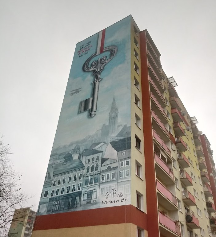 Mural - Bydgoszcz jest Polska 1920